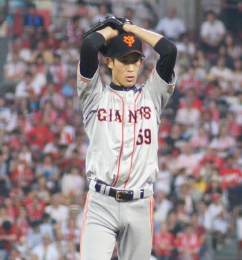 Giants_koyama59